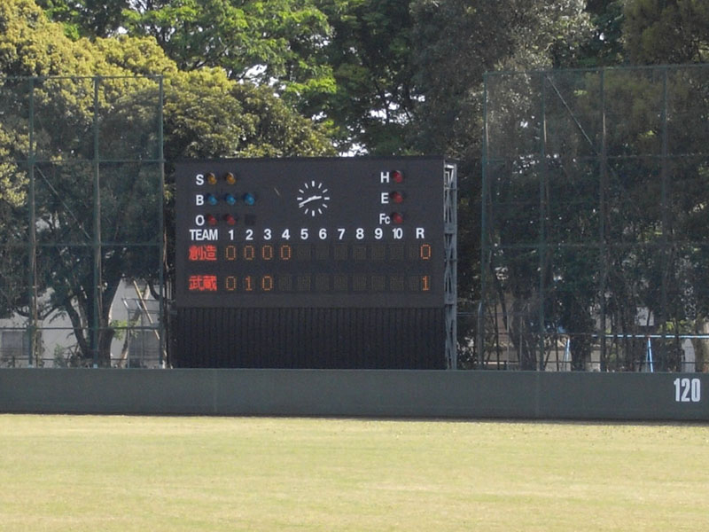 駒沢オリンピック公園硬式野球場